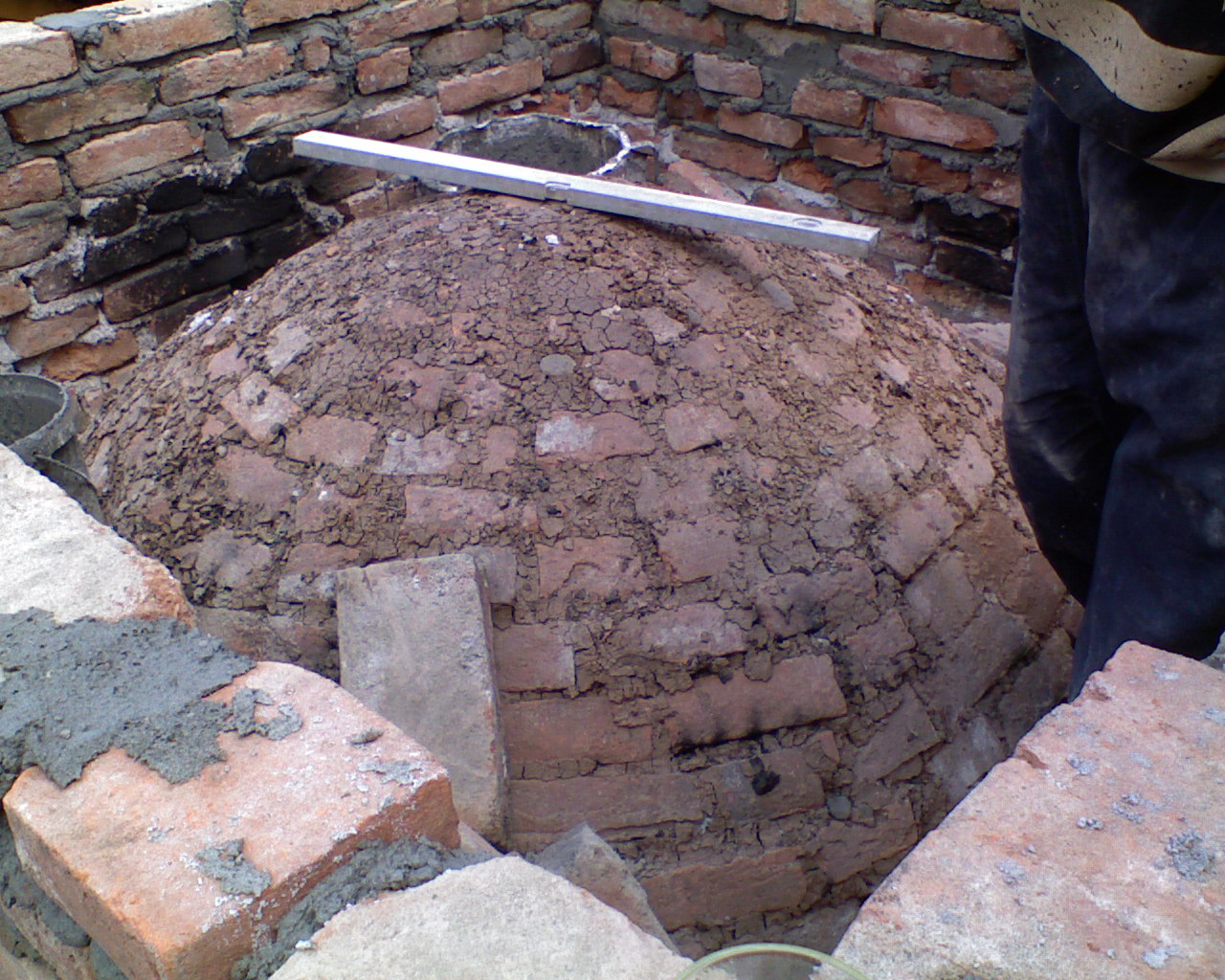 Поглед на "кубе", тј. горњи зид фуруне облика полулопте.